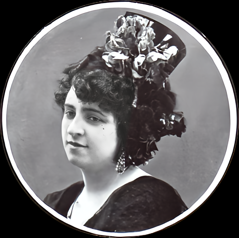 Aurora Janffret, «La Goya» en la revista Caras y Caretas 23/05/1914, n. 816, página 62.